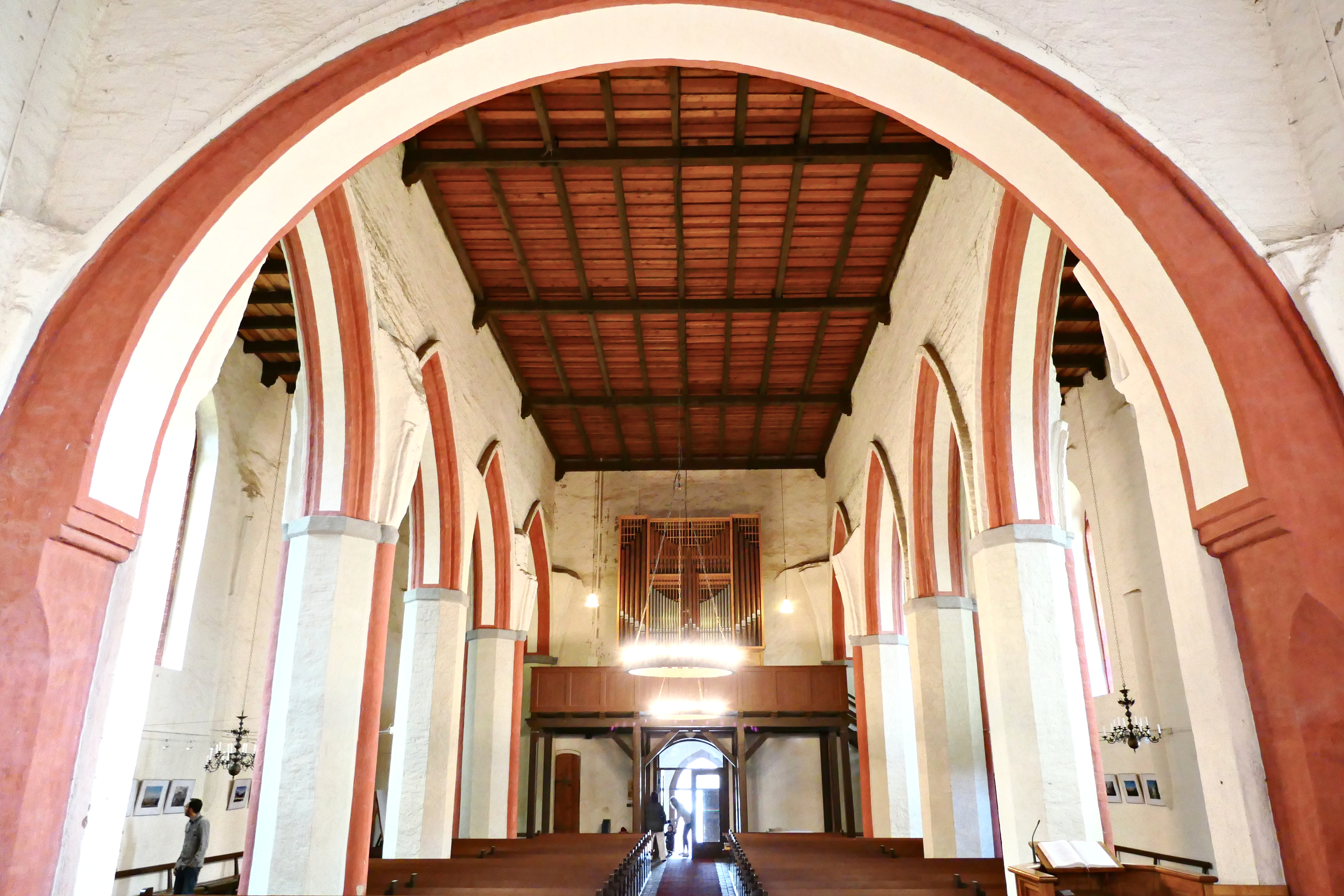 Orgel in Woldegk, Landkreis Mecklenburgische Seenplatte, Mecklenburg-Vorpommern, Deutschland